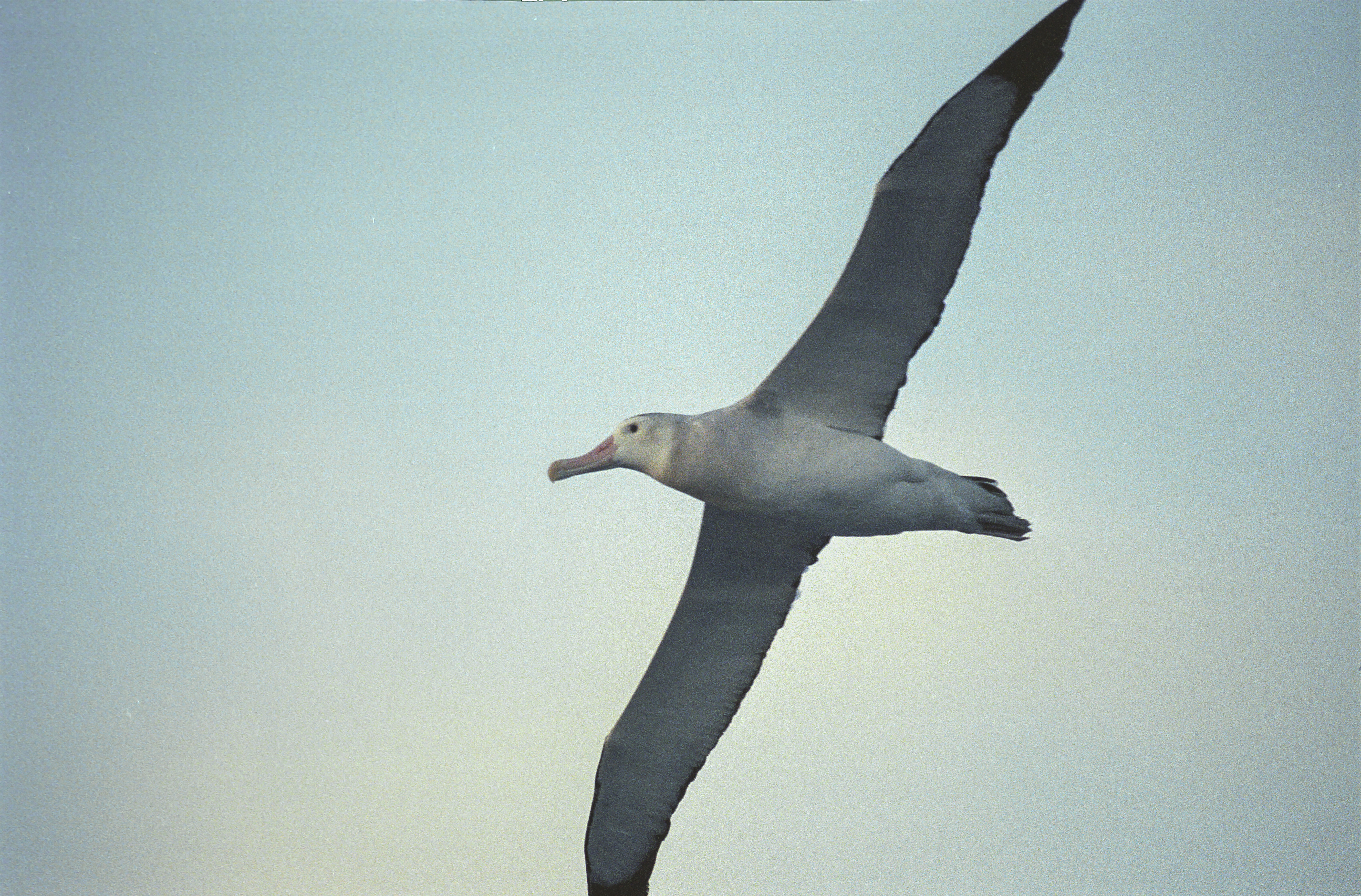 Antarctica, albatros